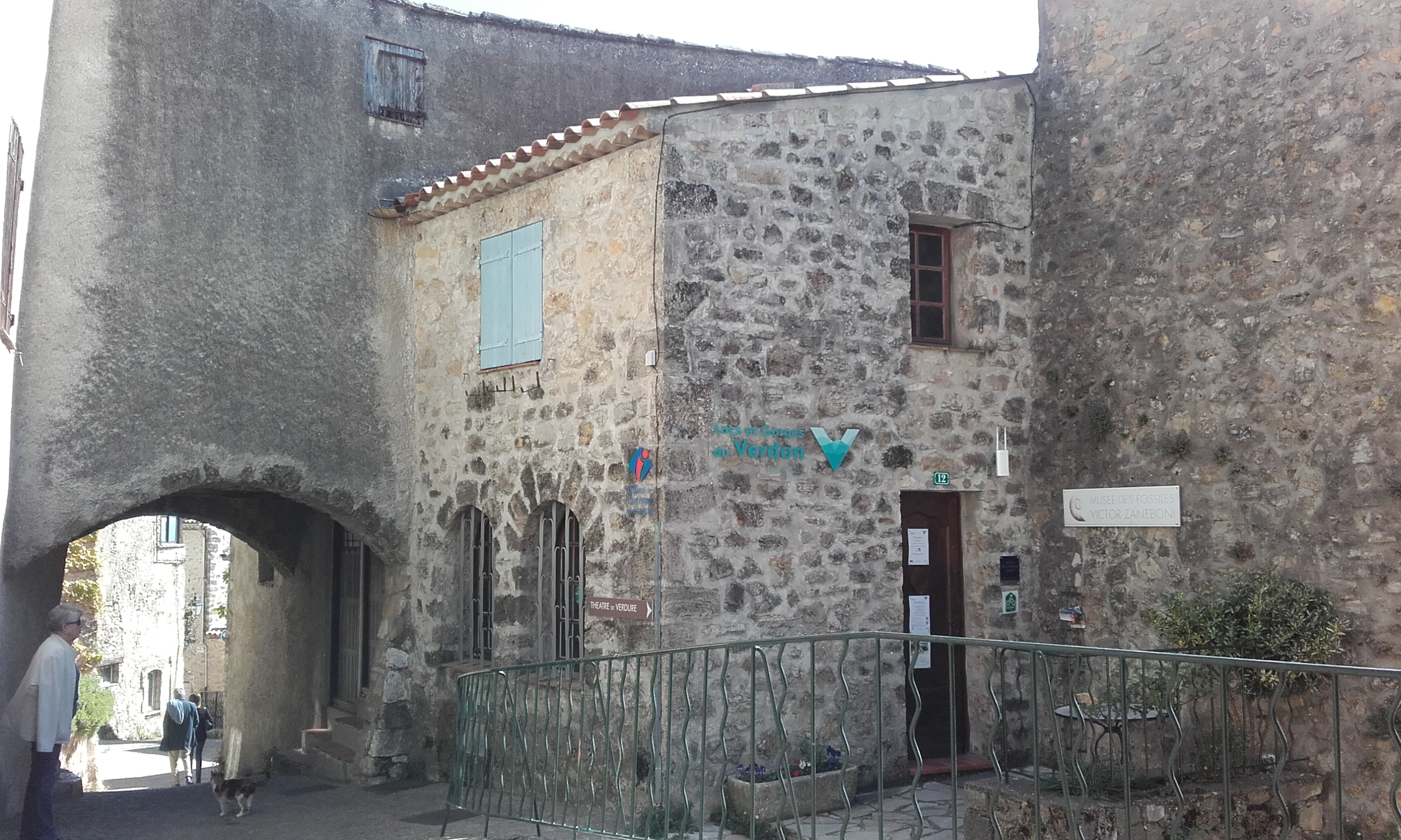 Var, Tourtour, Le Musée des fossiles, qui abritait précédemment l'Office de tourisme relevant de la Communauté de communes Lacs et gorges du Verdon